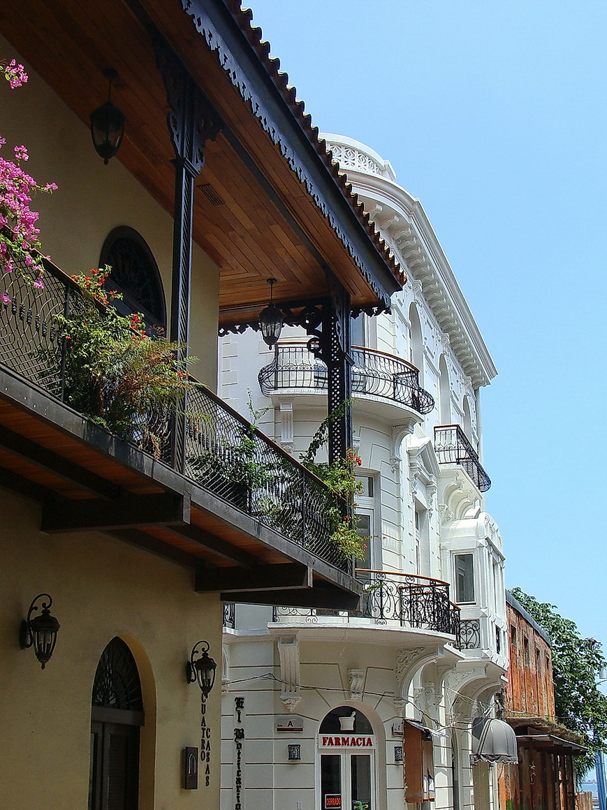 casas en el casco viejo de Panamá